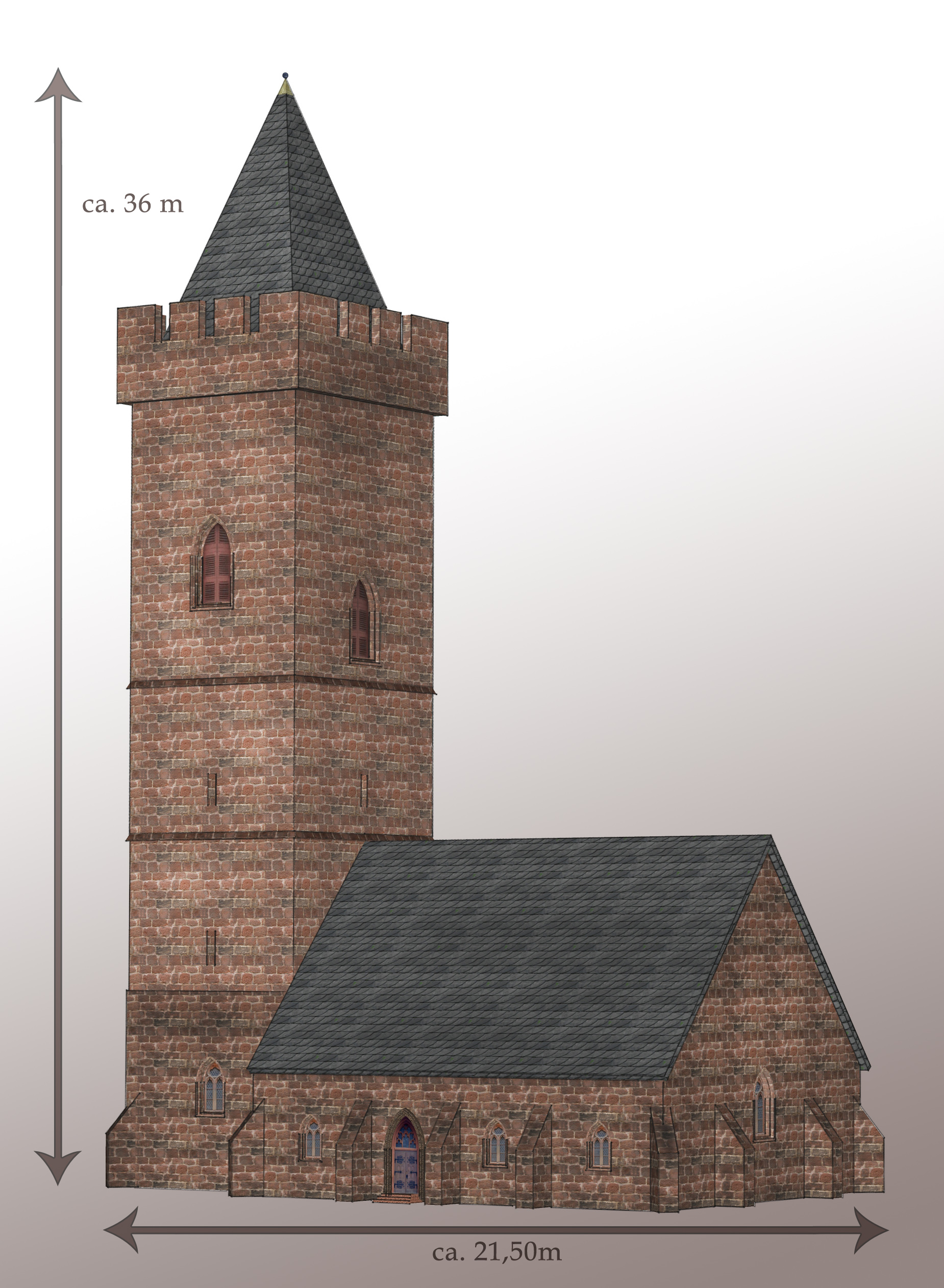 Virtuelle Rekonstruktion der gotischen Kirche (14.Jh.), vor dem Abriß des Schiffes in der zweiten Hälfte des 18. Jahrhunderts und dem Neubau des barocken Saalbaues. Im Modell ist deutlich das proportionale Missverhältnis zwischen Turm und Schiff zu erkennen. Das massive Mauerwerk sowie der Zinnenkranz deuten auf die einstige Nutzung als Wehrturm hin. (Erstellt nach Grundrissskizzen in: S. Altmayer; M. Ries: 1686–1986 300 Jahre katholische Pfarrei Göllheim nach ihrer Wiedererrichtung)